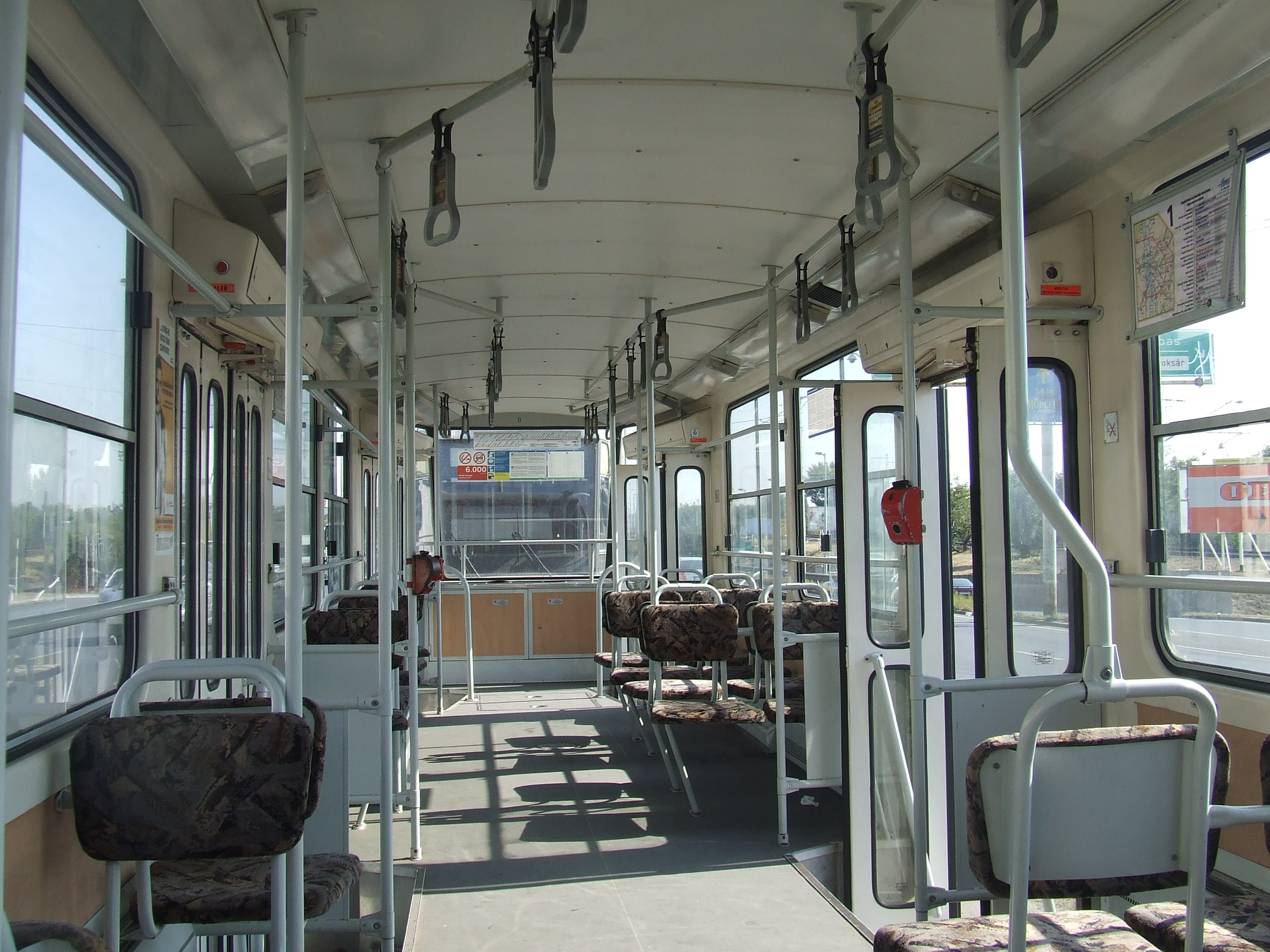 Budapest, Tatra T5C5, utastér